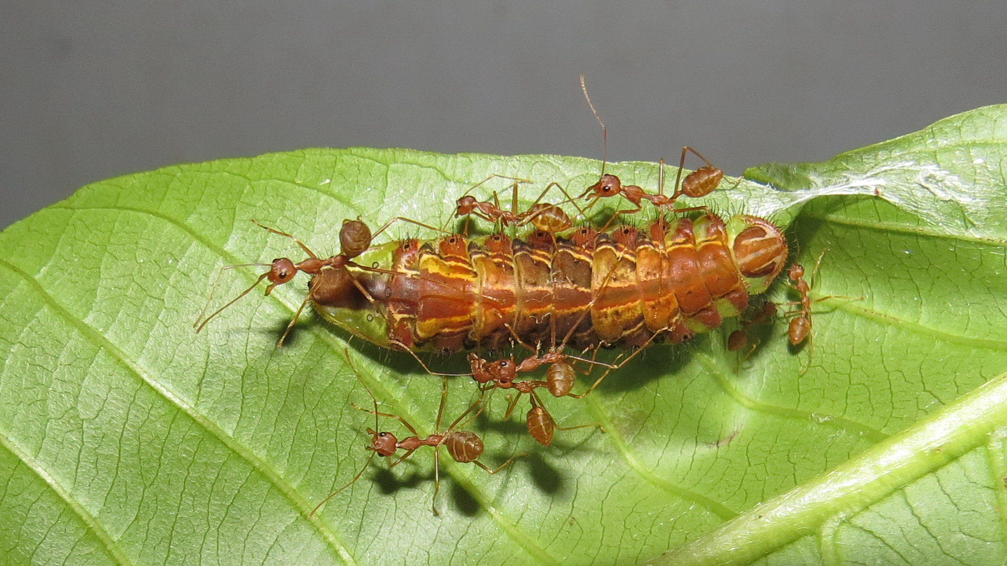 Photos by Vinayaraj